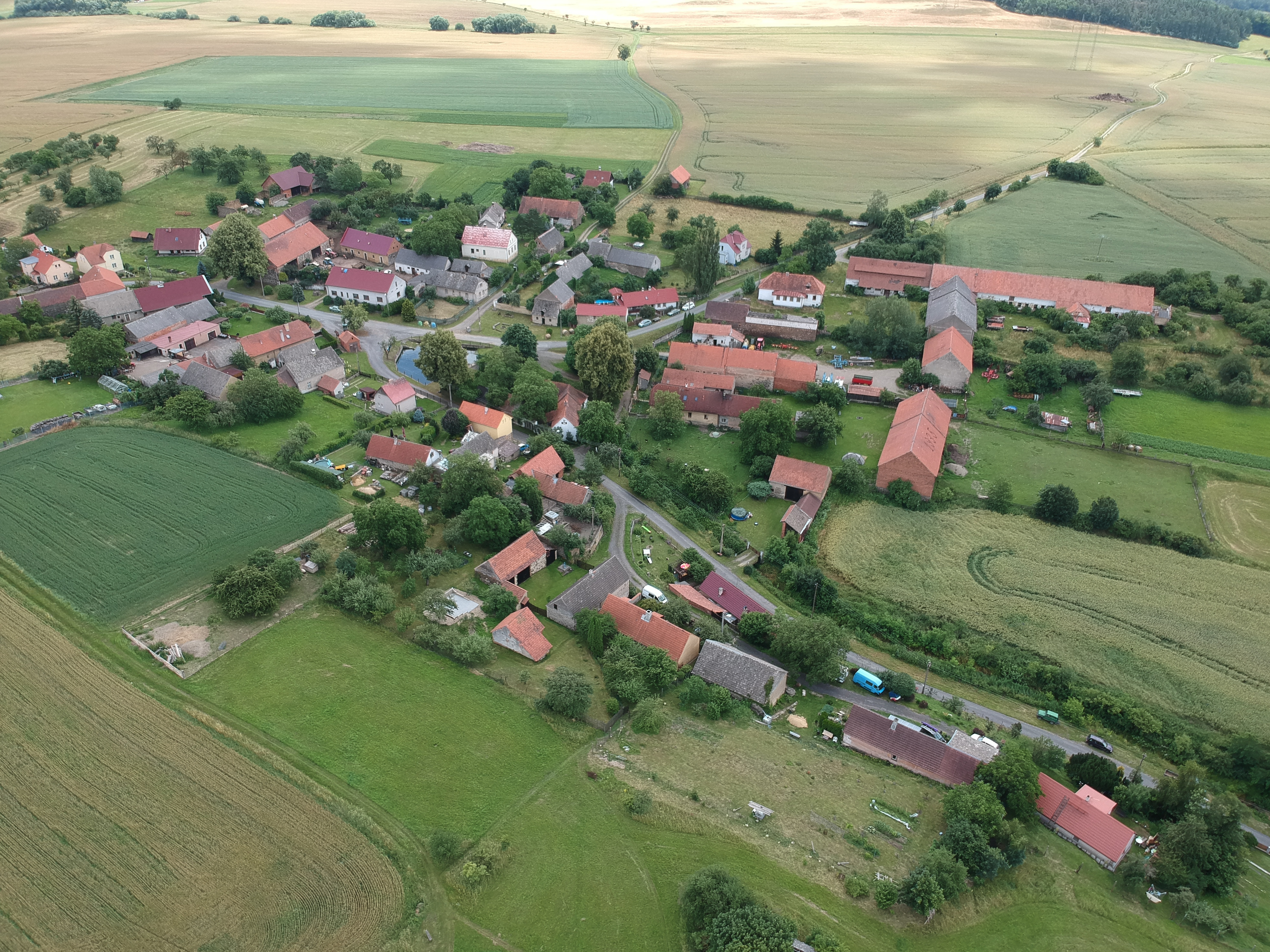 Letecký snímek obce Újezdec.